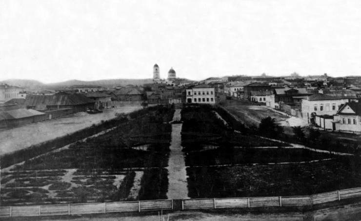 Самара. Александровский сад (Лишин сквер). На заднем плане Вознесенский собор. Фотография. 1869 год.